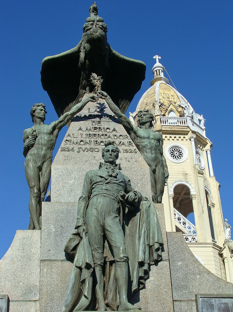 Monumento en honor al Libertador por el centenario del congreso anfictiónico.